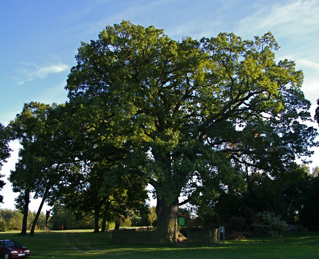 Dąb Bolko w miejscowości Hniszów